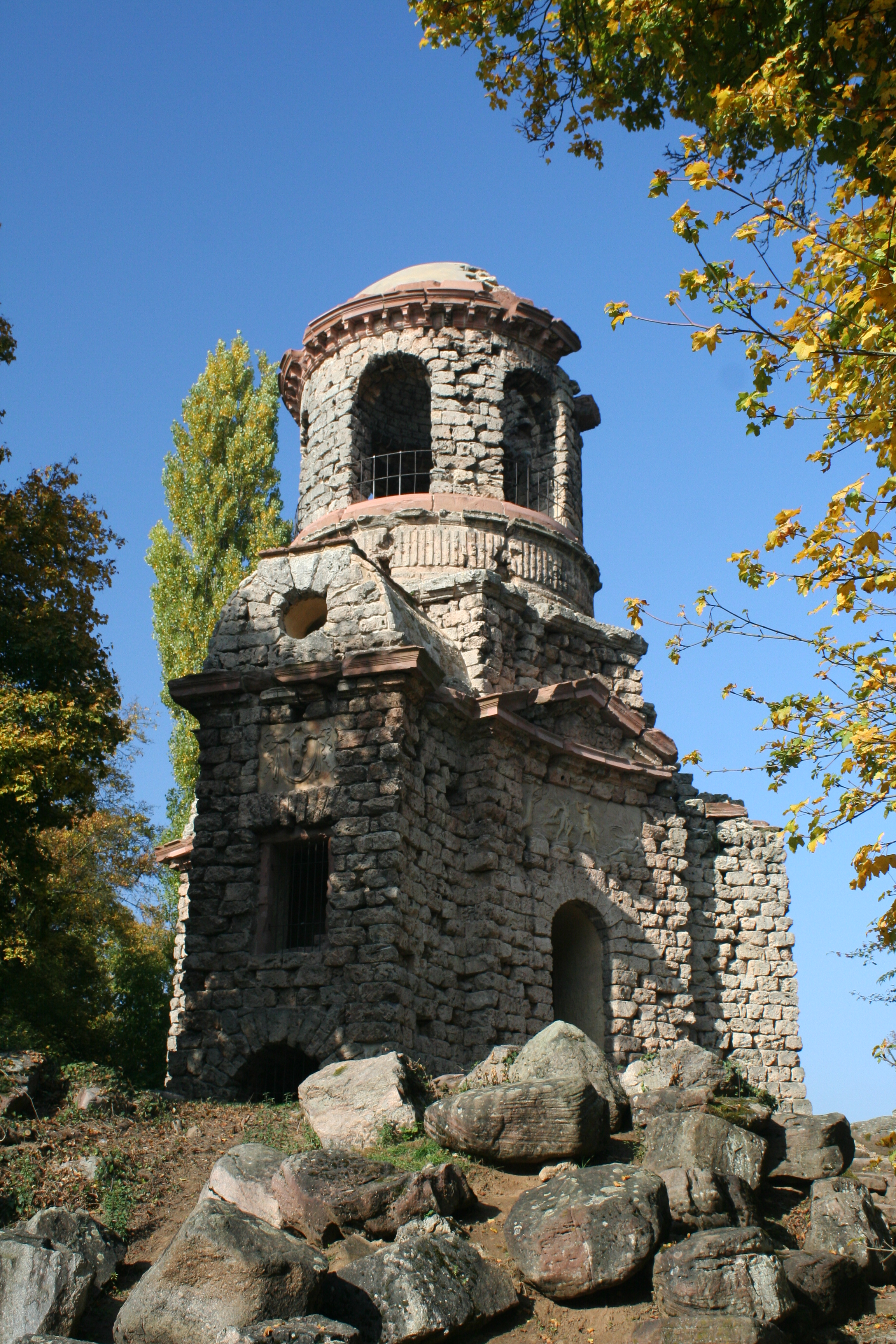 Schwetzingen, Merkurtempel